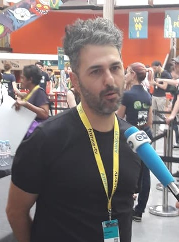 Alê Abreu au festival international d'animation d'Annecy 2018.